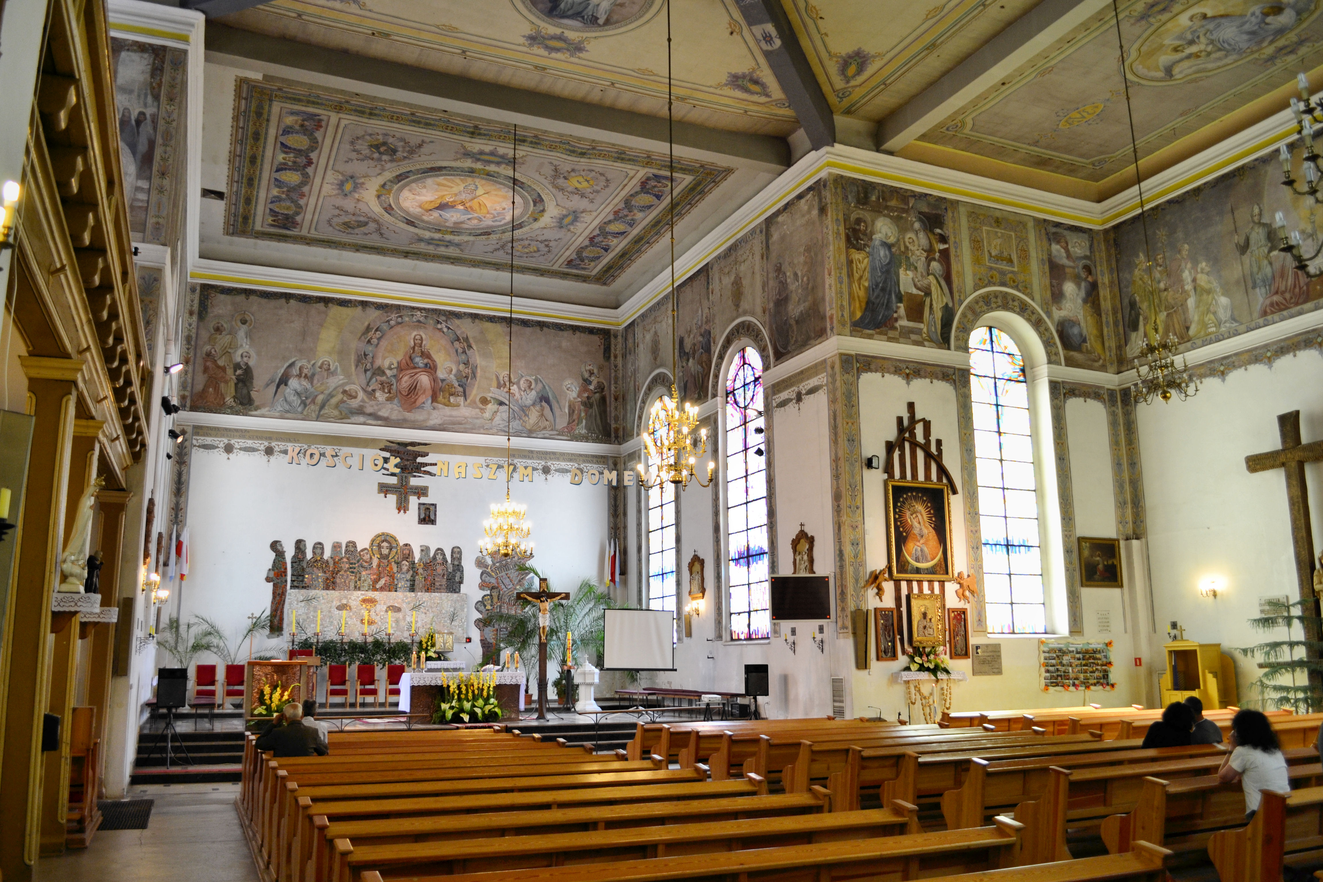 Kościół Podwyższenia Krzyża Świętego w Czaplinku